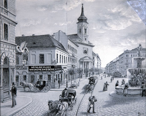 A mai Kálvin téren az Oroszlános-ház (a 2 szintes ház balra) és a református templom az 1883 utáni néhány évben (Fliesz Rezső grafikája). (Már áll a Danubius-kút, amit 1883-ban avattak fel.)